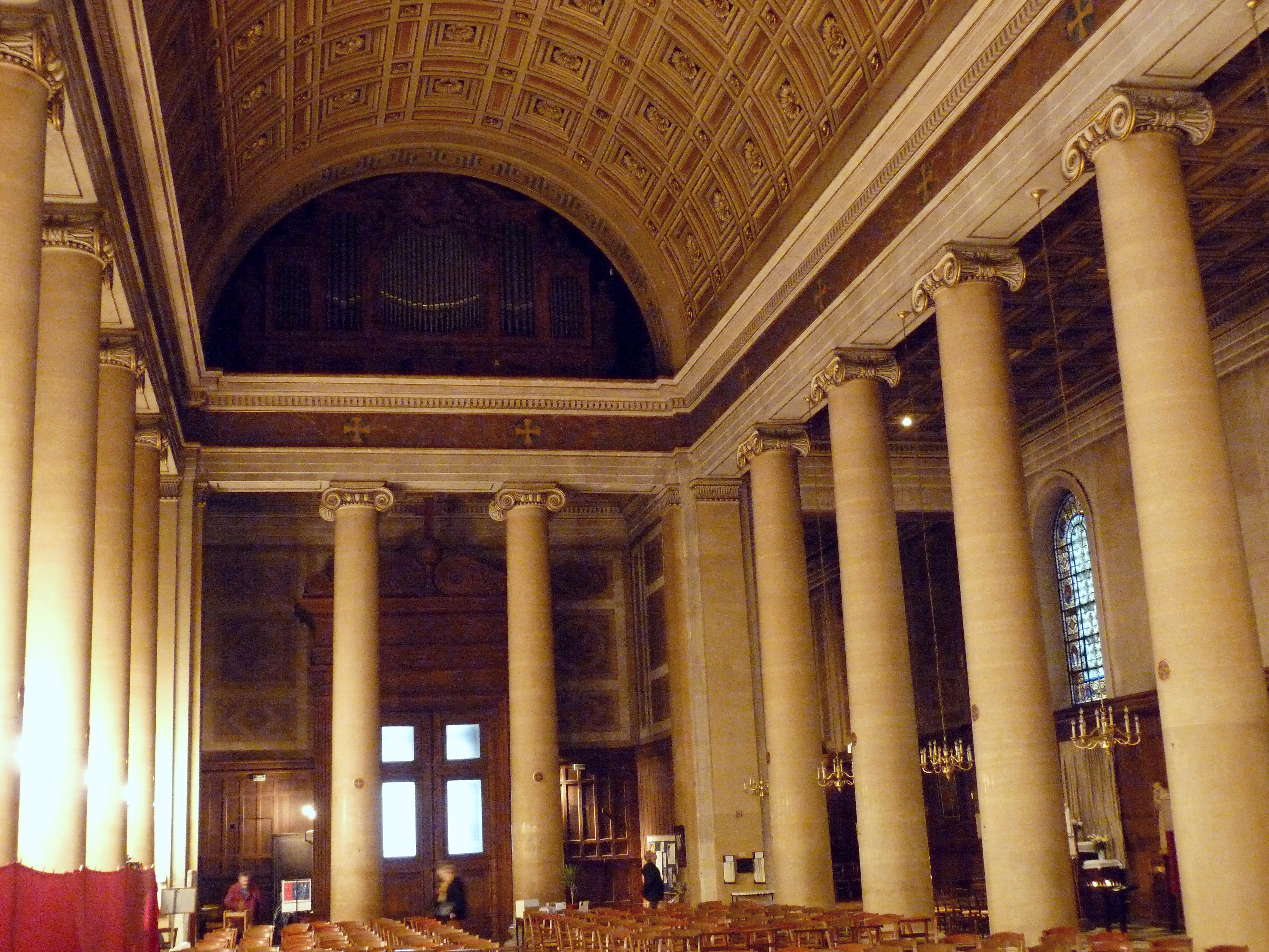 Nef de l'église Saint-Denys-du-Saint-Sacrement, construite en 1835, Paris (3e arrondissement).